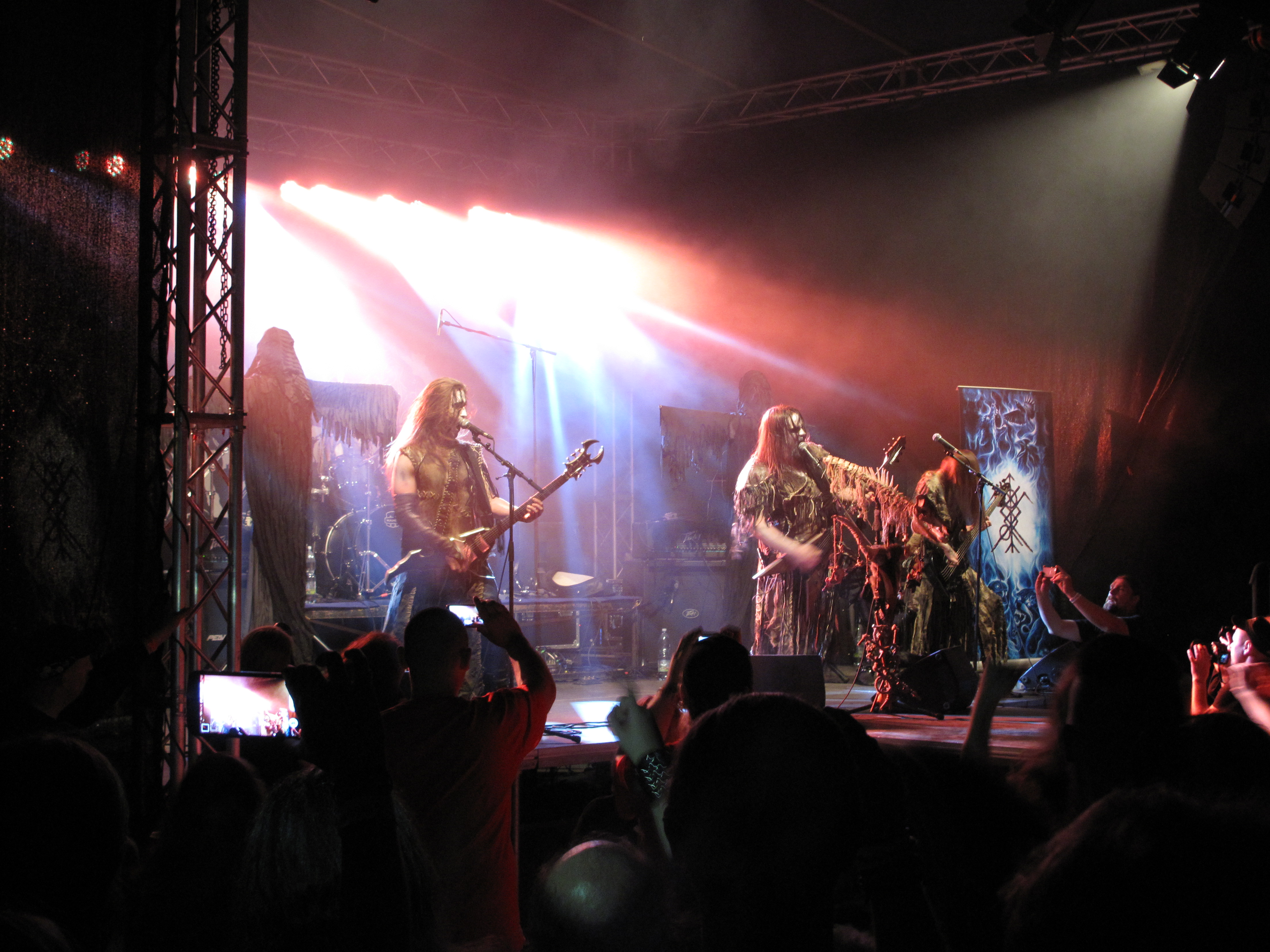 Nokturnal Mortum na festivalu Hell Fast Attack